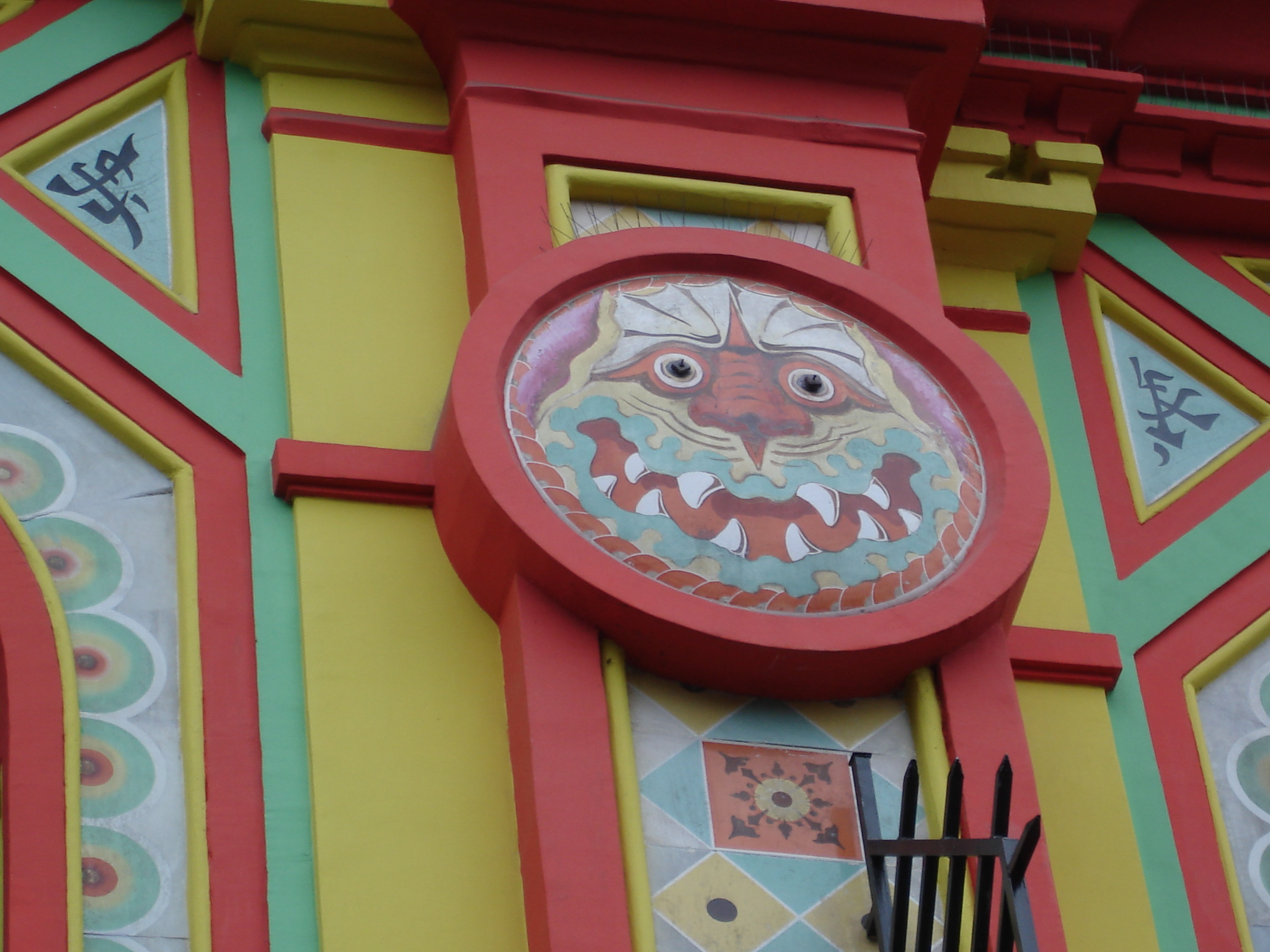 Bataclan -Bd Voltaire -Detail